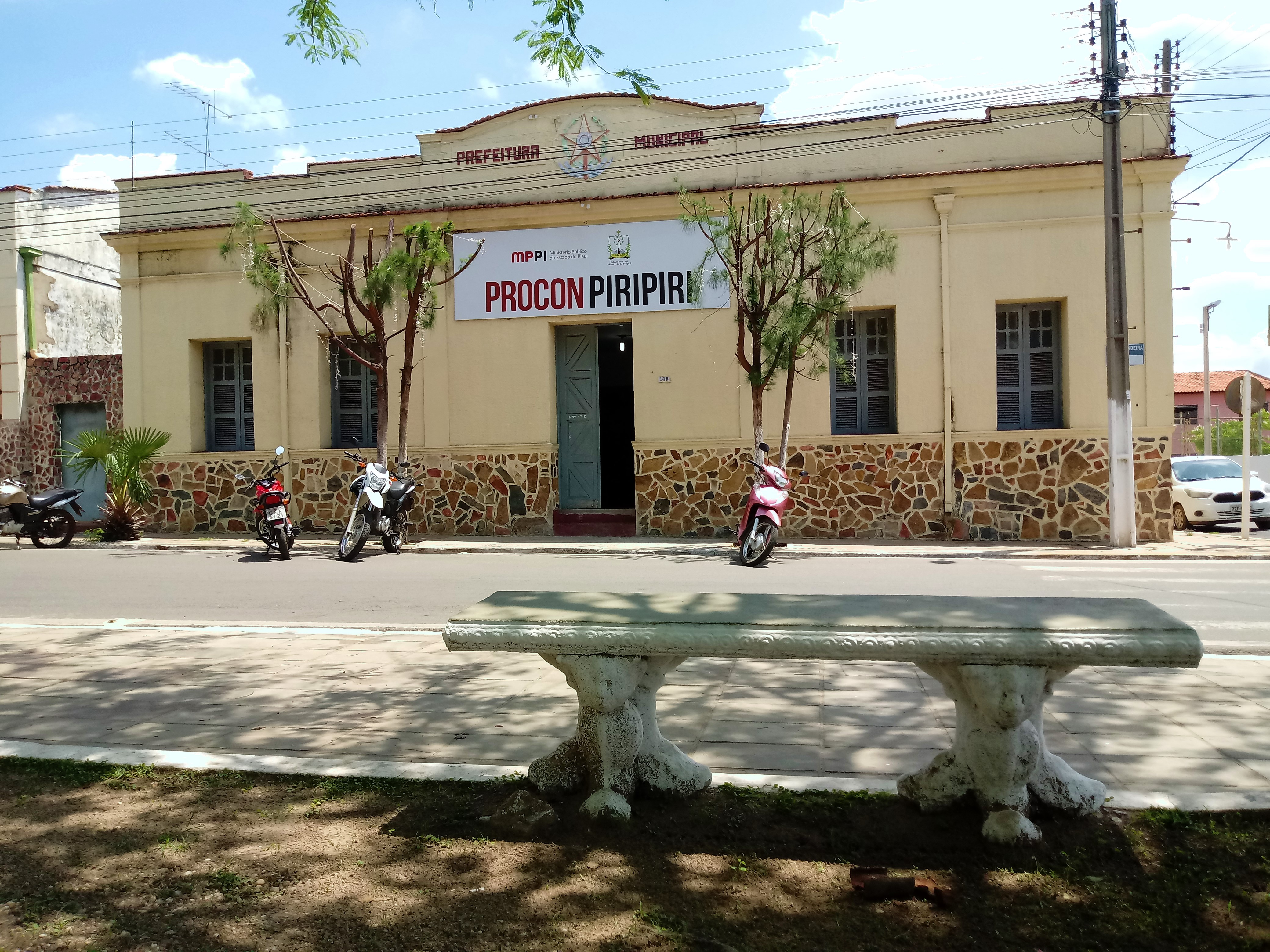 Palacete histórico da antiga prefeitura de Piripiri, tem o brasão nacional ensculpido na frente.